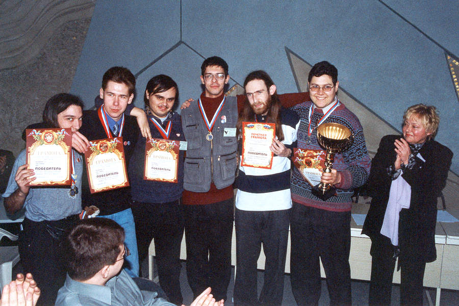 Команда «Ксеп» и Н. И. Стеценко на церемонии награждения призёров II чемпионата России по «Что? Где? Когда?». 3 февраля 2002 года, Московский городской дворец детского (юношеского) творчества.